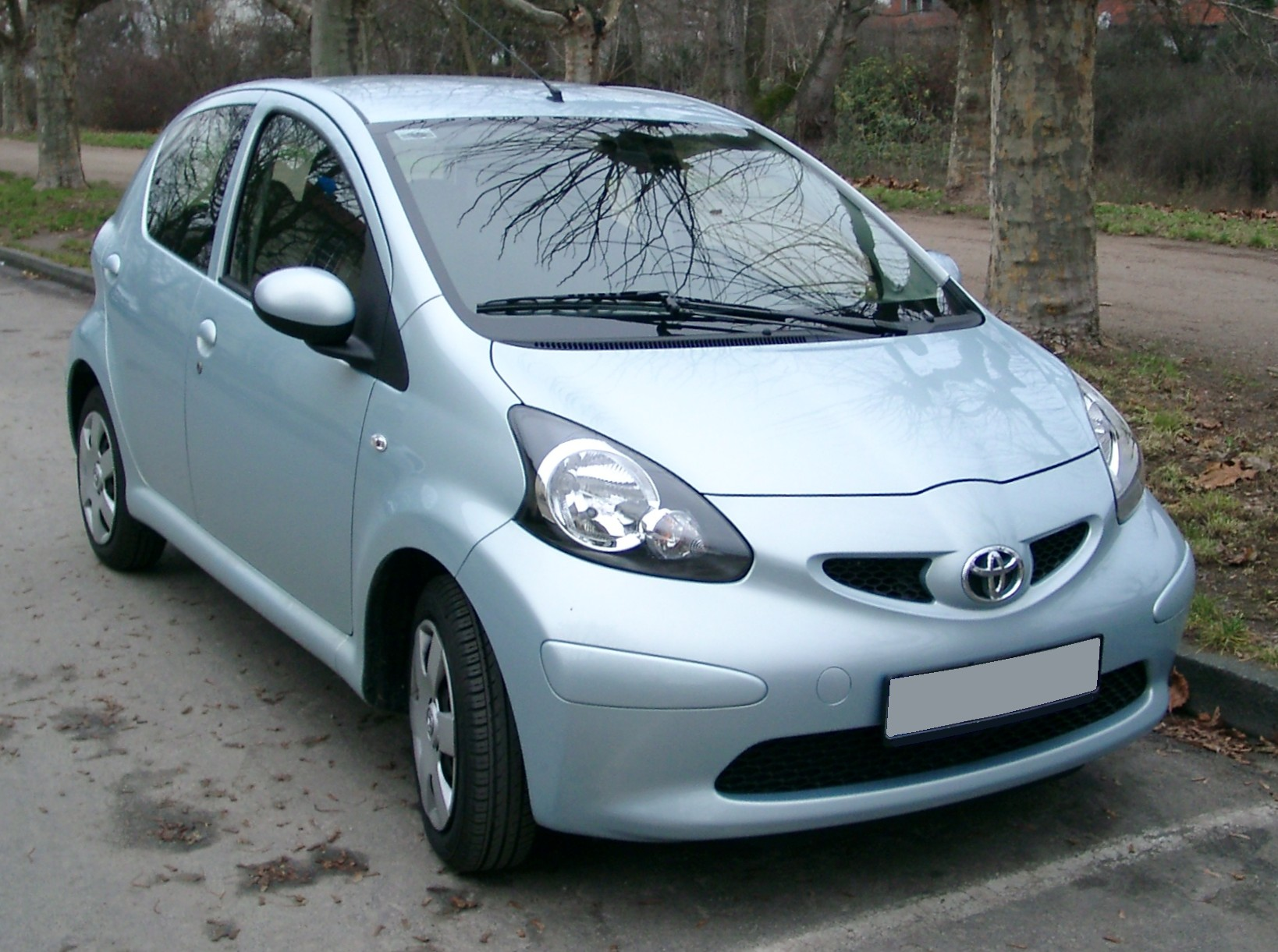 Toyota Aygo